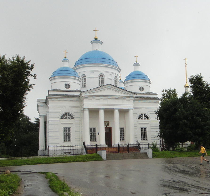 Собор Успенский (Брянская область, Мглин, Пролетарская улица)